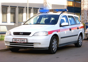 Streifenwagen der Österreichischen Bundesgendarmerie. Originalversionen auf Anfrage erhältlich